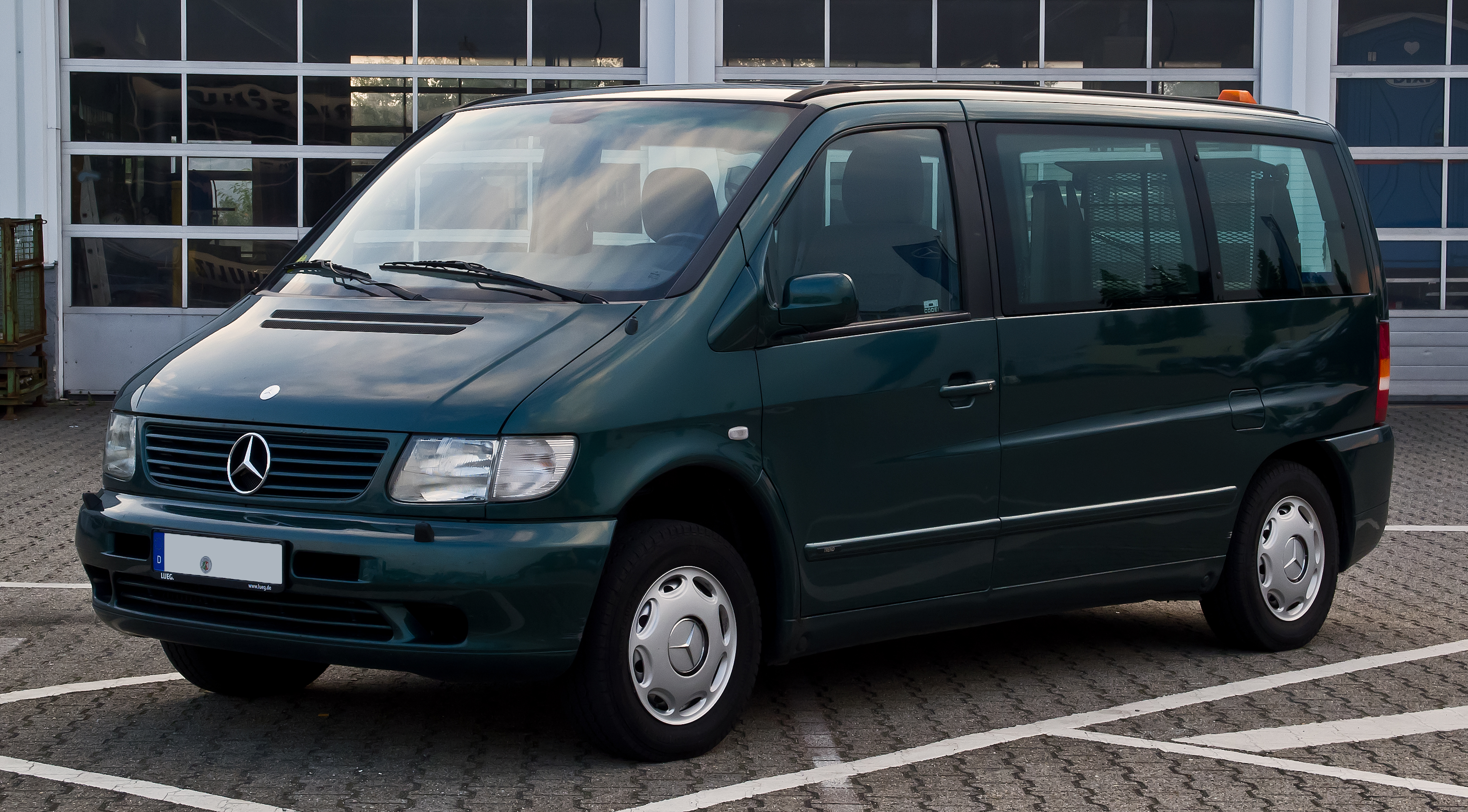 Mercedes-Benz V 220 CDI Trend (W 638)